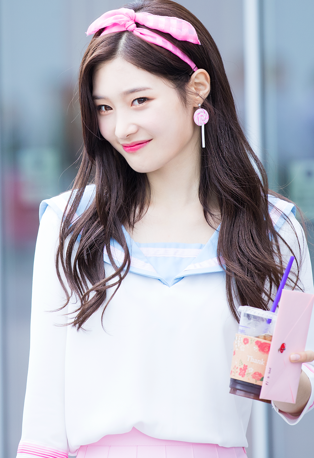 170516 정채연